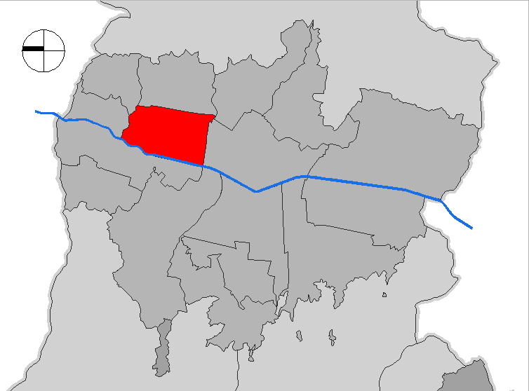 mapa de la comuna Aranjuez. Medellín, Colombia.